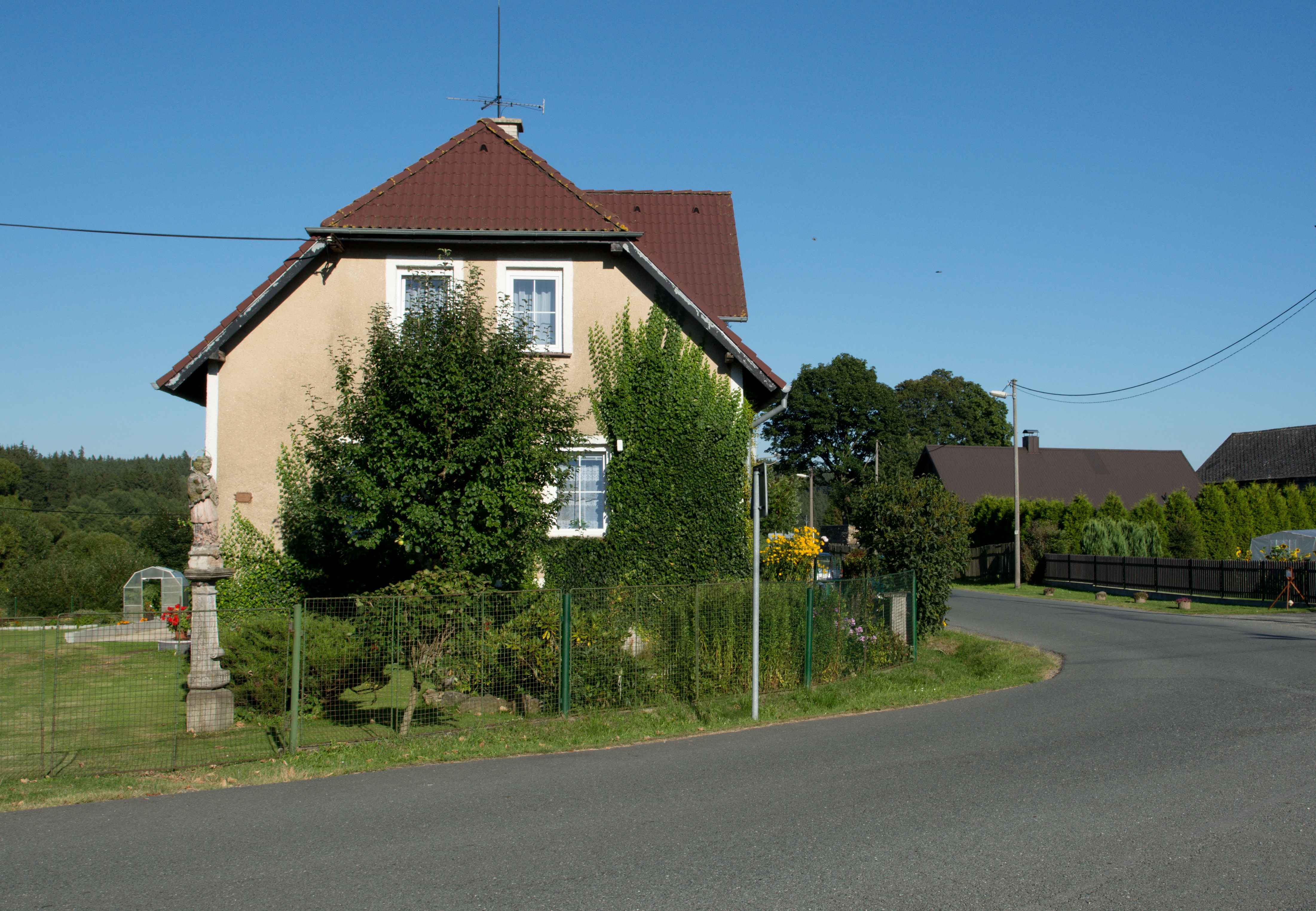 Svobodka dům se sochouv sv. Jana Nepomuckého